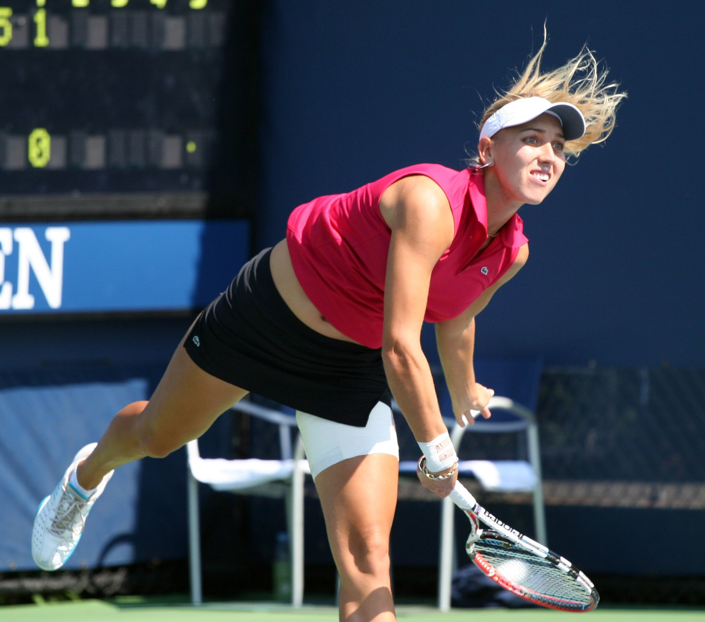 U.S. Open Saturday, Sept. 5, 2009